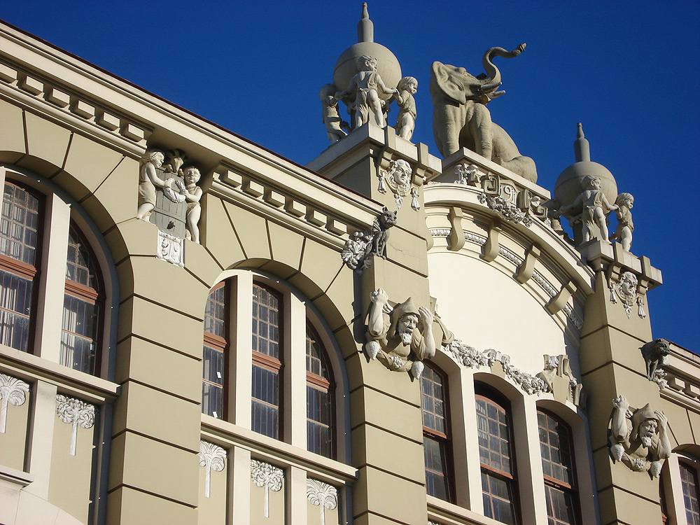 detalhe da fachada do prédio da antiga Cervejaria Brahma, hoje o Shopping Total, Porto Alegre, Brasil.